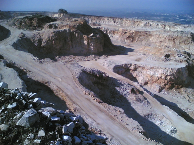 Pedreira na Serra de Candeeiros — Parque Natural das Serras de Aire e Candeeiros. Próximo de Rio Maior, Portugal.